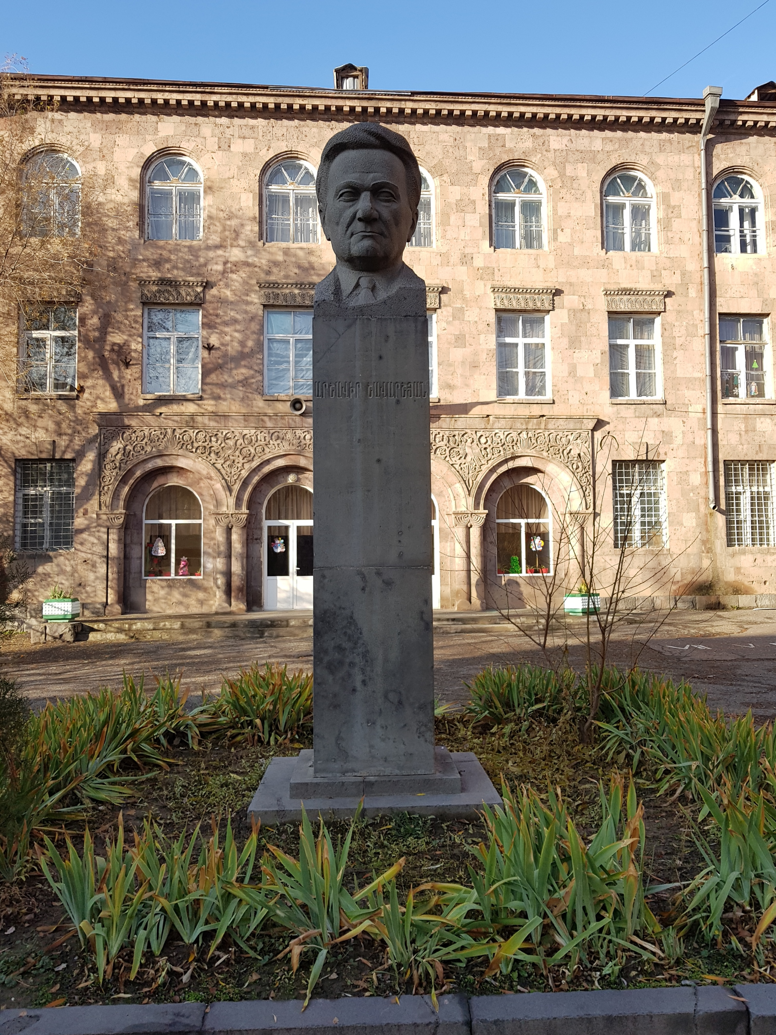 Arshavir Shavarshyan's bust in front of school named after him on Vardanants street, Yerevan 6/136